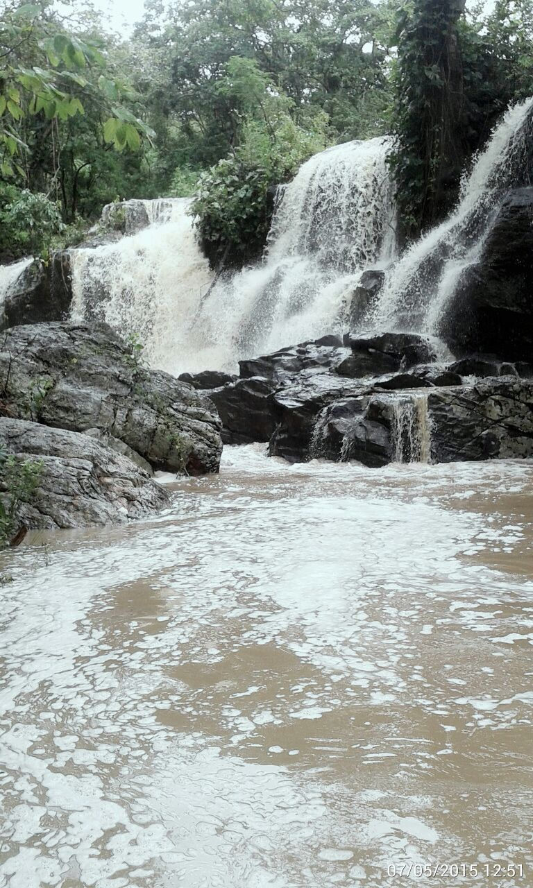 Palmácia-CE